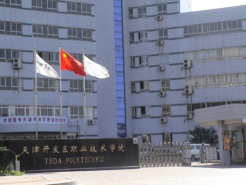 2002年08月07日15时28分44秒摄于天津经济技术开发区第三大街天津开发区职业技术学院对面